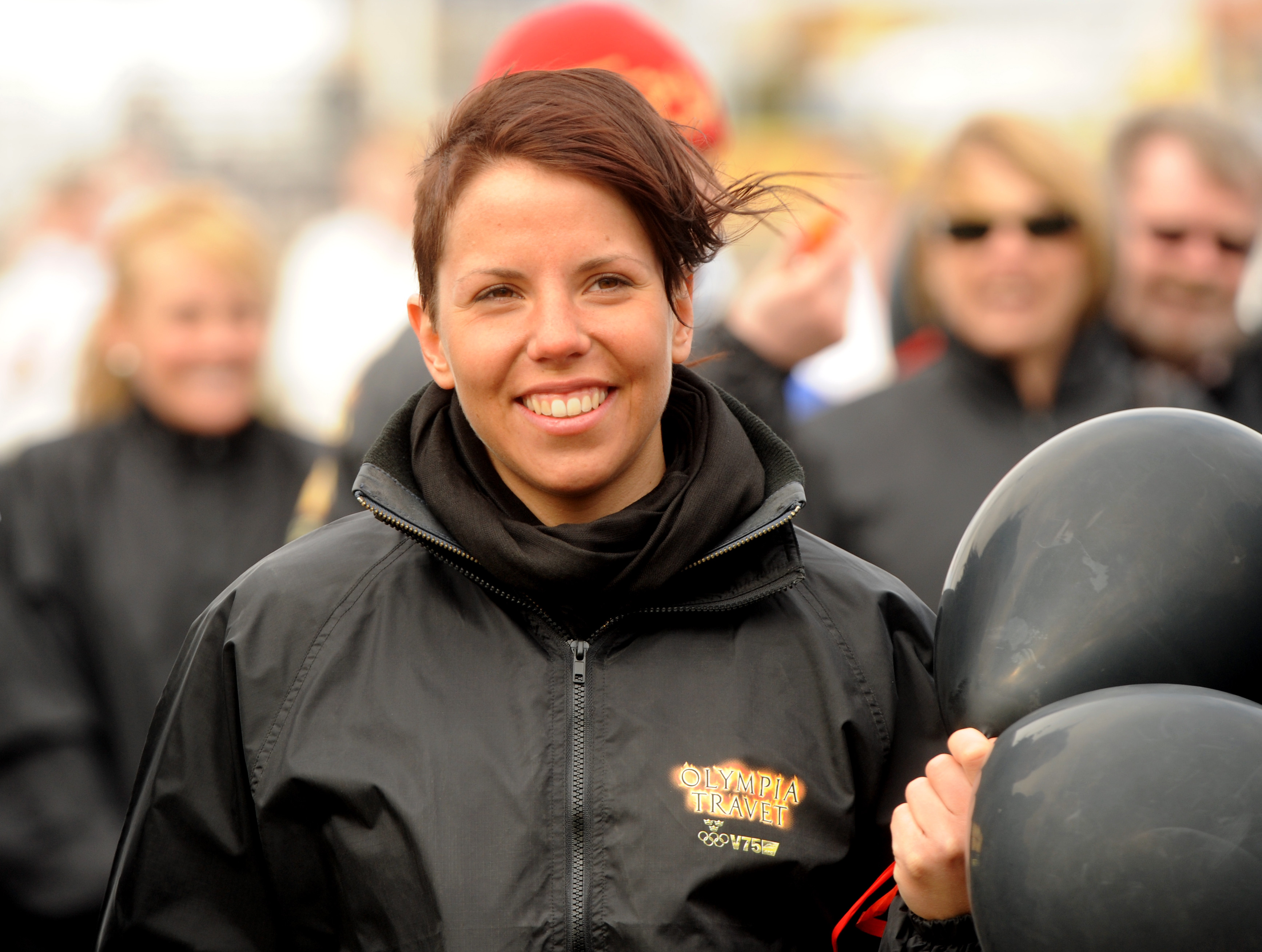 Charlotte Kalla på Olympiatravet.